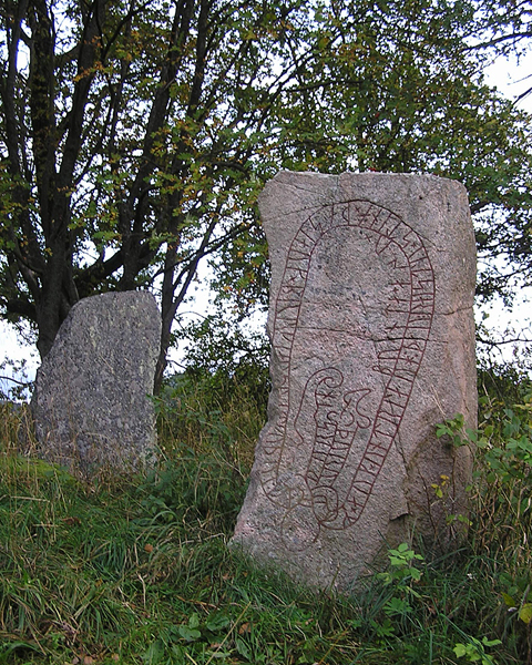 Sö328 med tillhörande bautasten